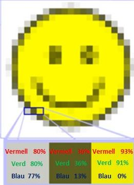 Exemple dels pixels d'una cara